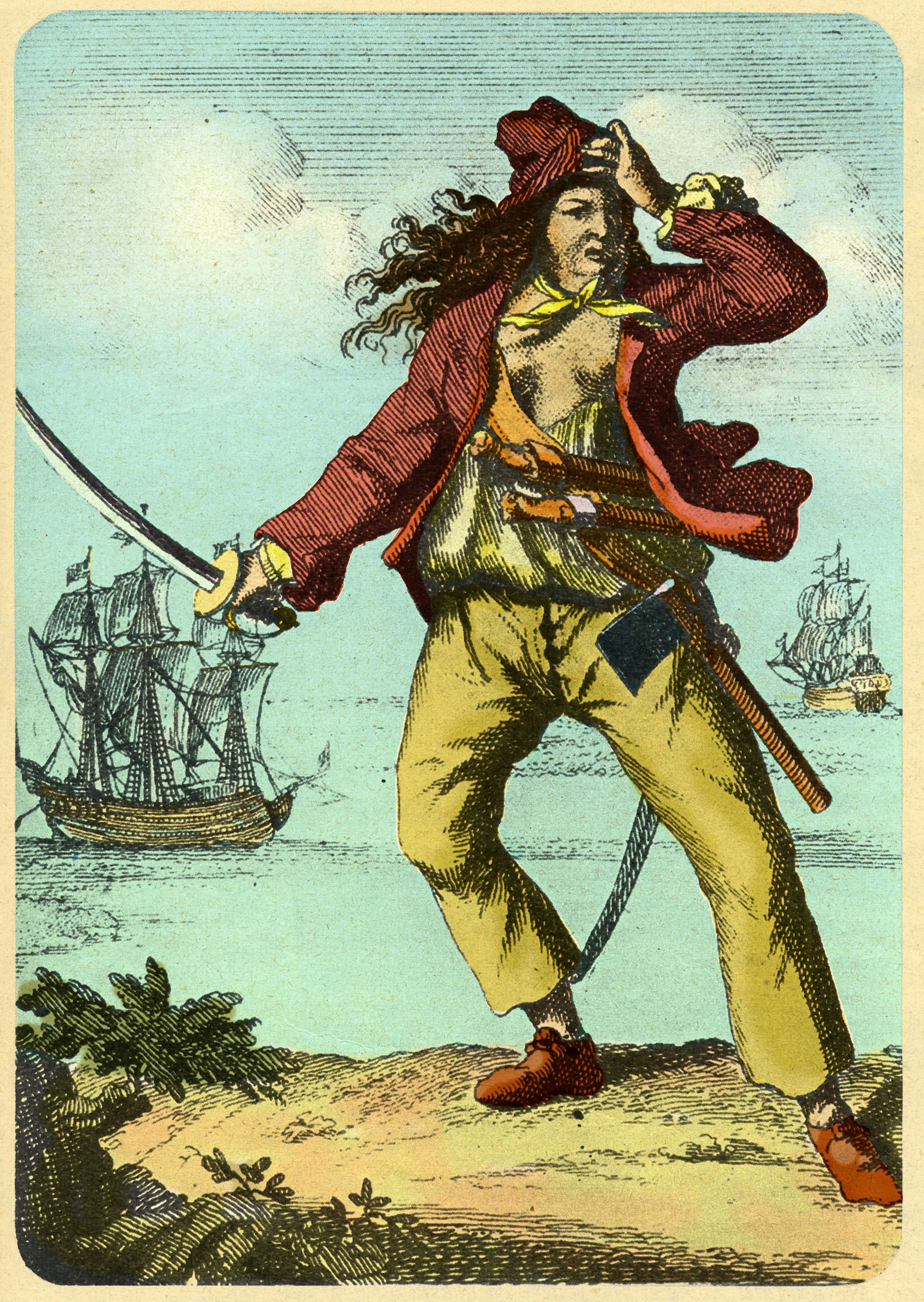 Gravure représentant Mary Read, vers 1710